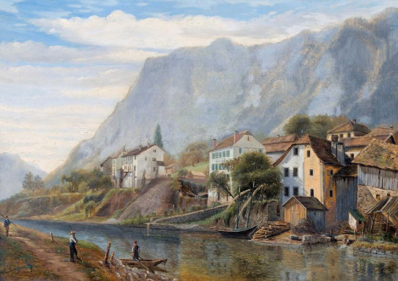 Village au bord de la rivière